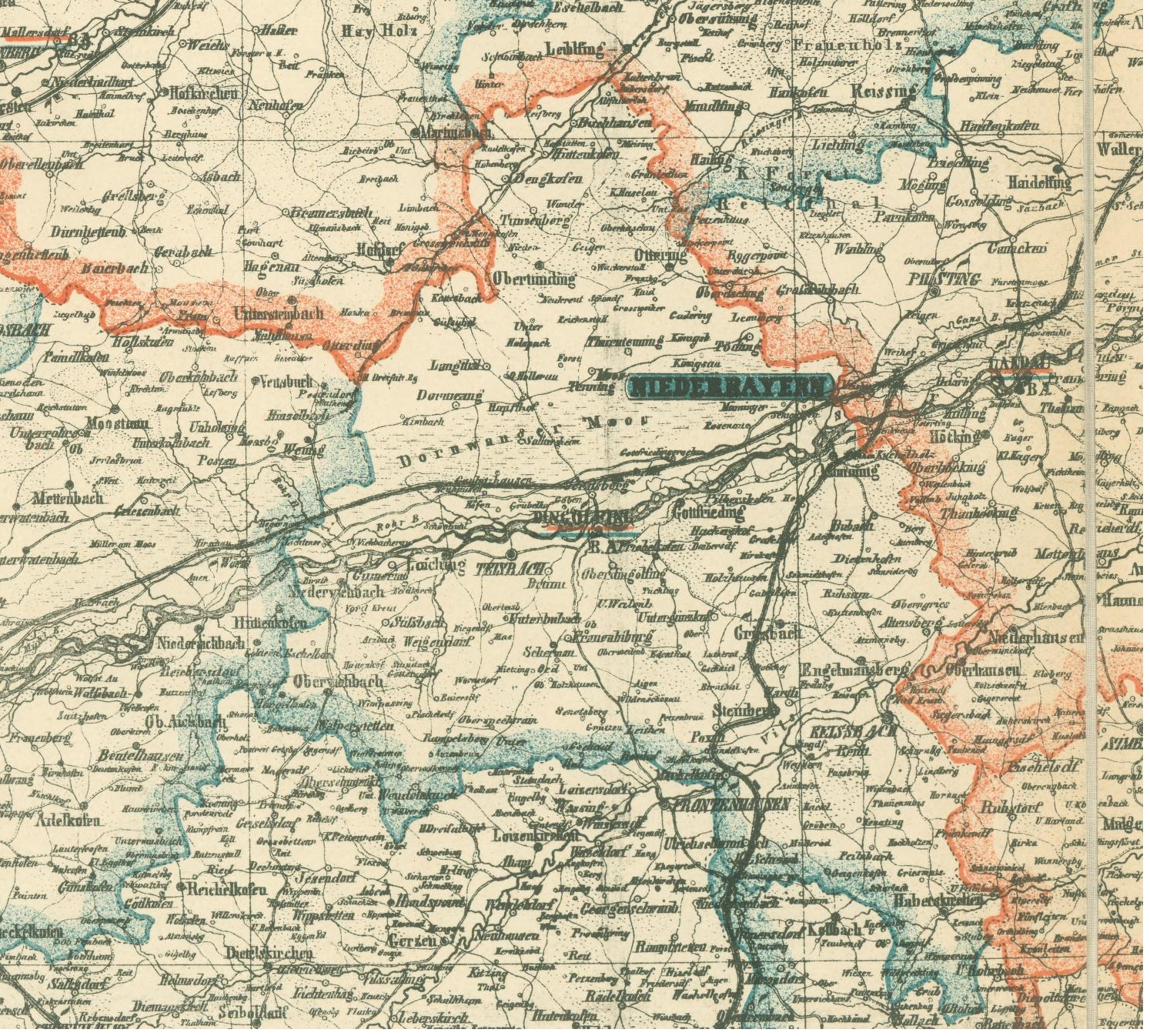 Karte von Niederbayern; Ausschnitt Bezirksamt Dingolfing (Vorläufer des Landkreises Dingolfing)